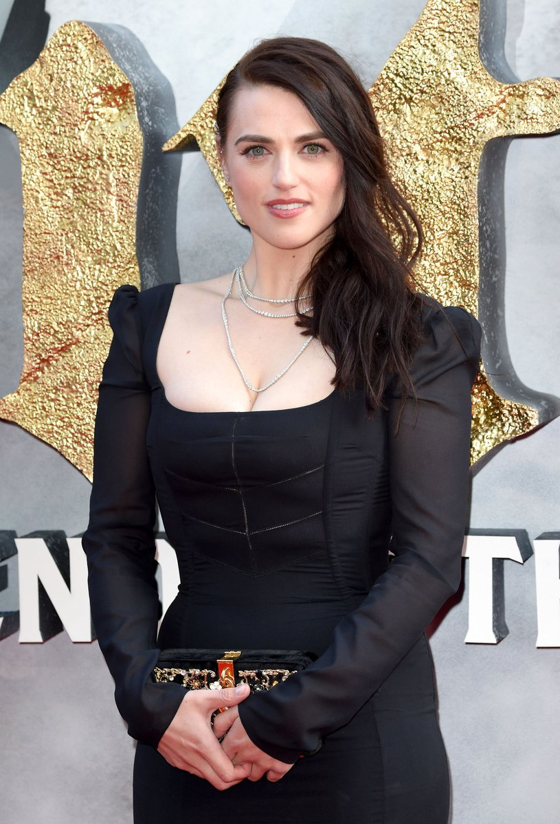 CCSD 2017